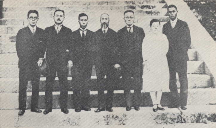 제3차 범태평양회의에 참석한 조선인 대표단 일행 (1929년 10월, 日本 京都)(김우평, 백관수, 유억겸, 윤치호, 김활란, 윤광선 등)